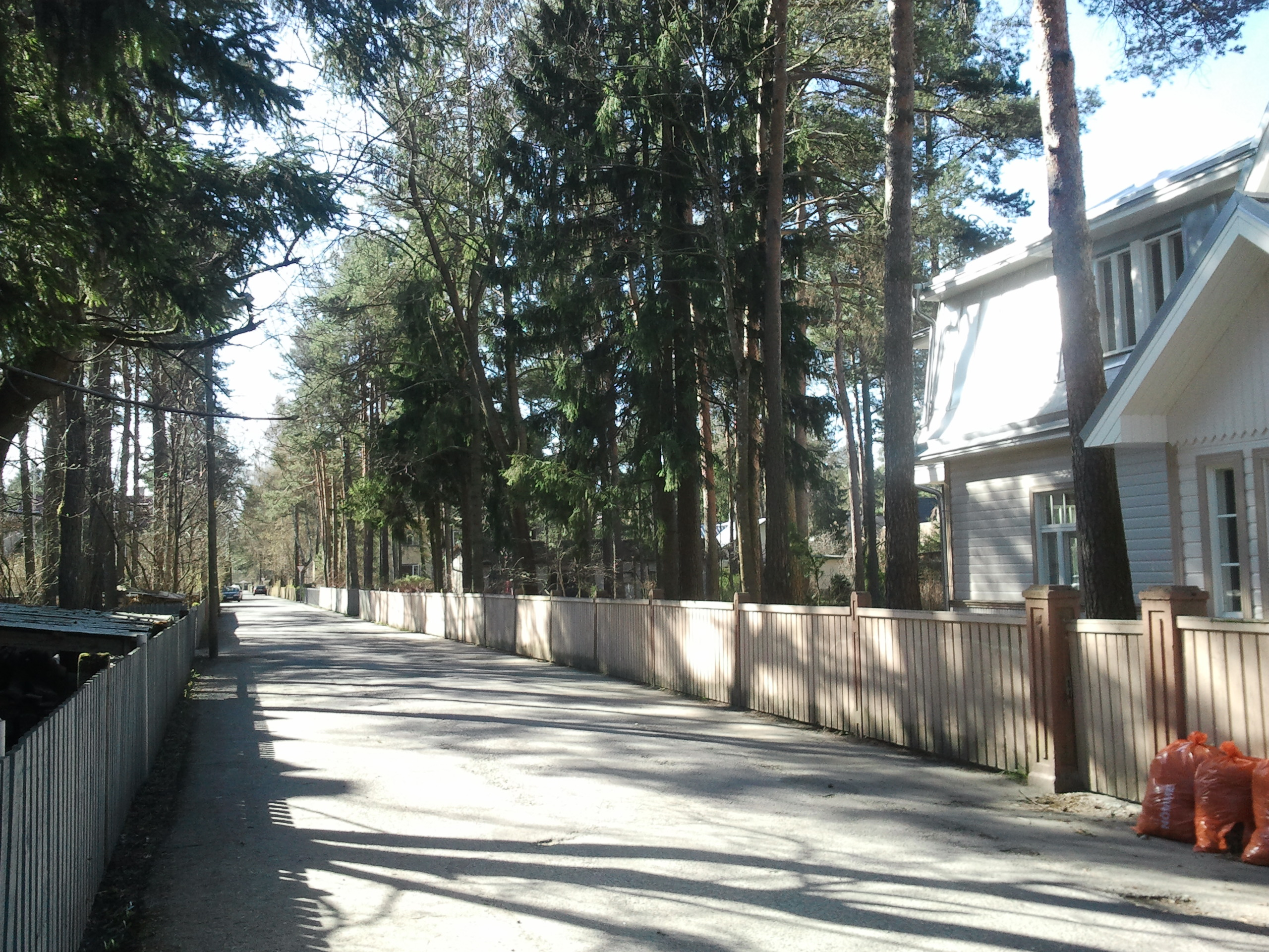 Kärje tänav